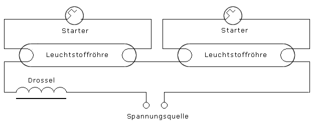 Schaltbild einer Tandemschaltung